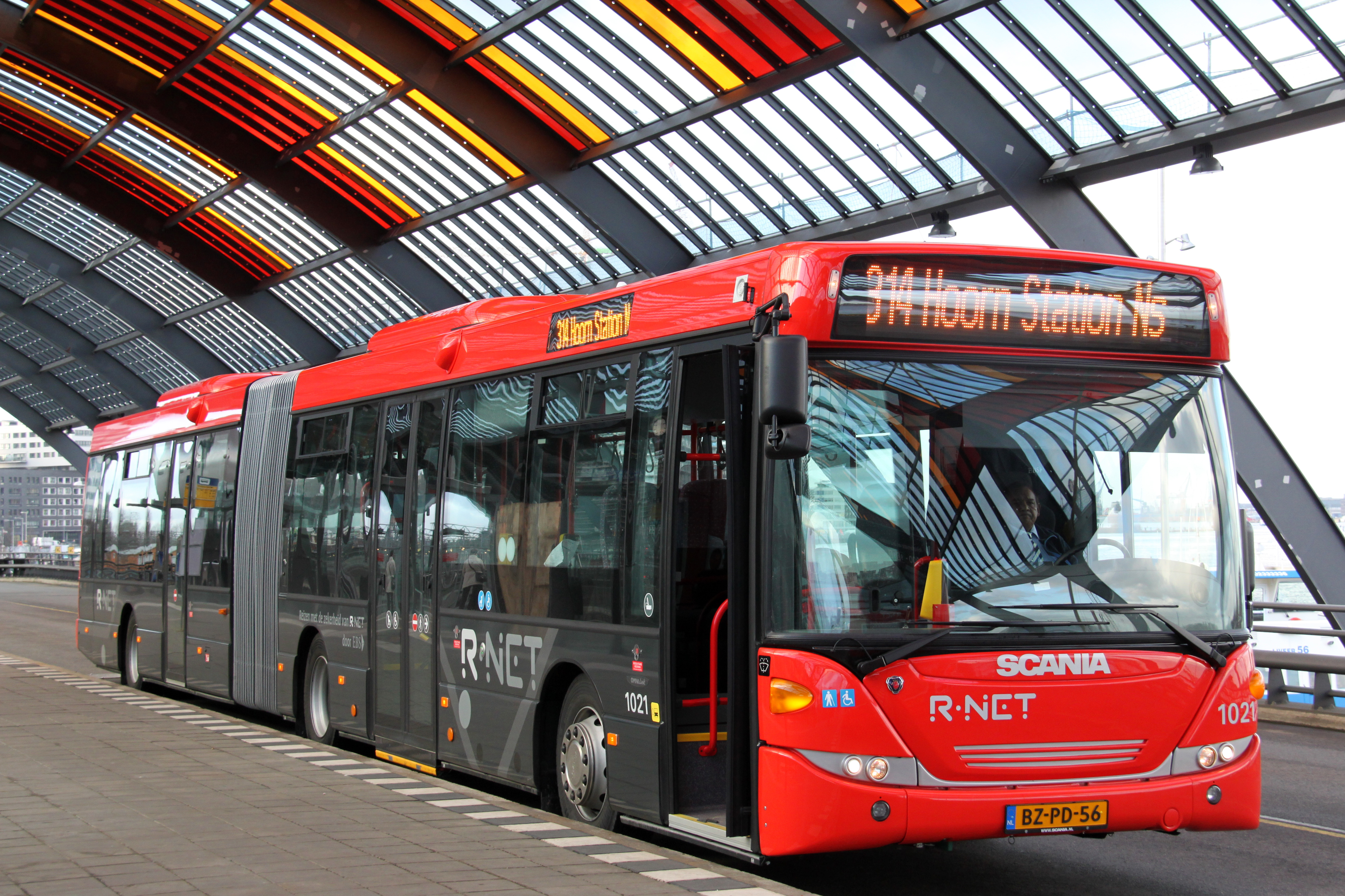 Een gelede Scania Omnilink in de kleurstelling van R-net van het bedrijf EBS op station Amsterdam Centraal.